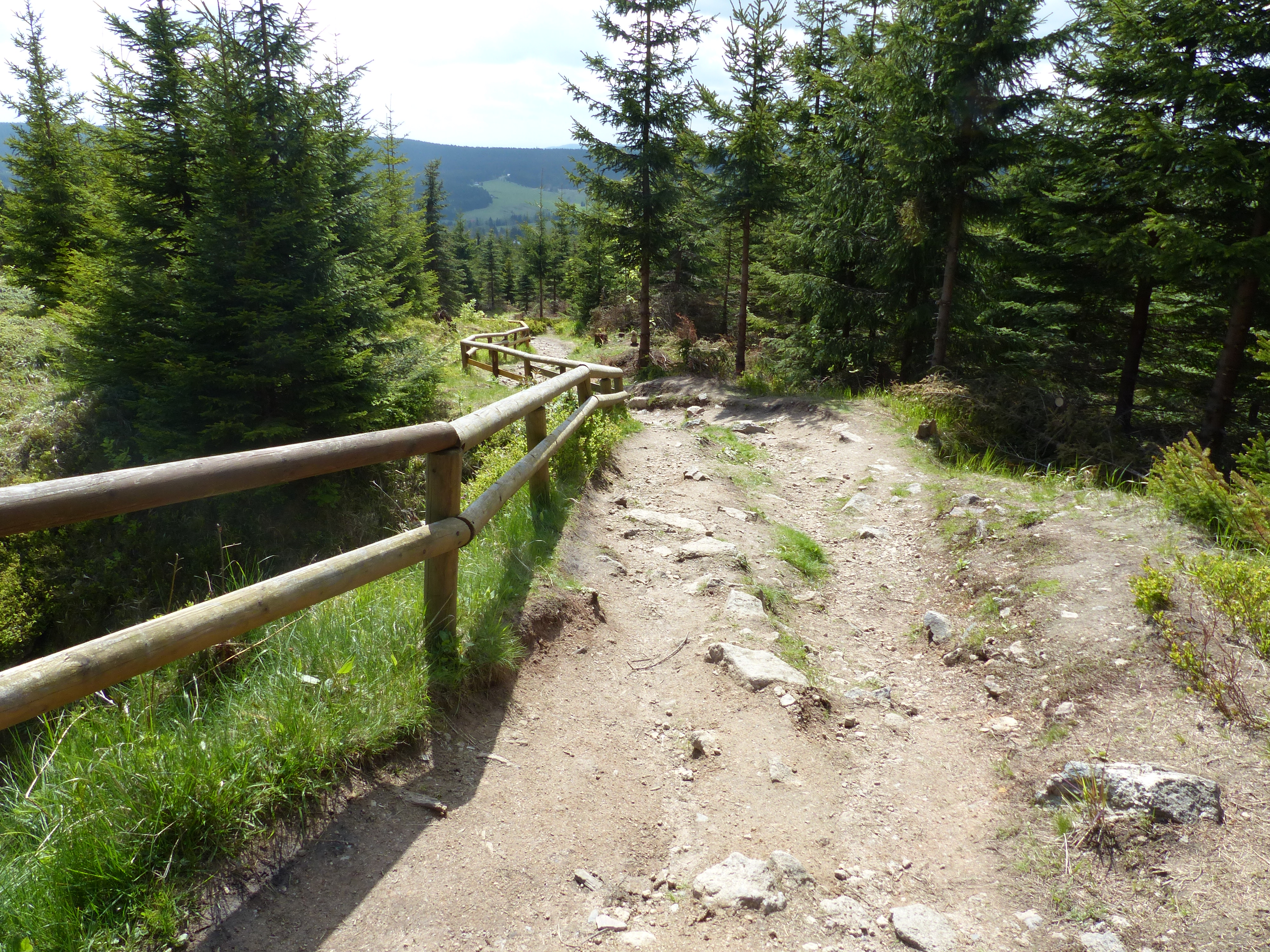 Blatenský vrch, Plattenberg